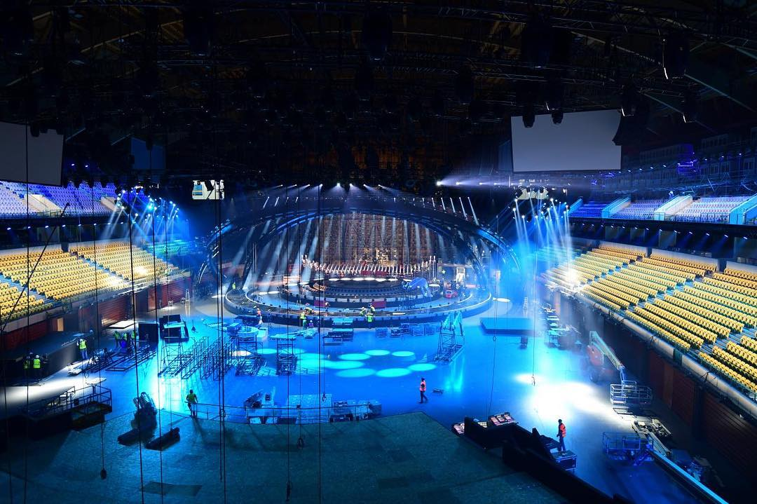 Escenario de Eurovisión